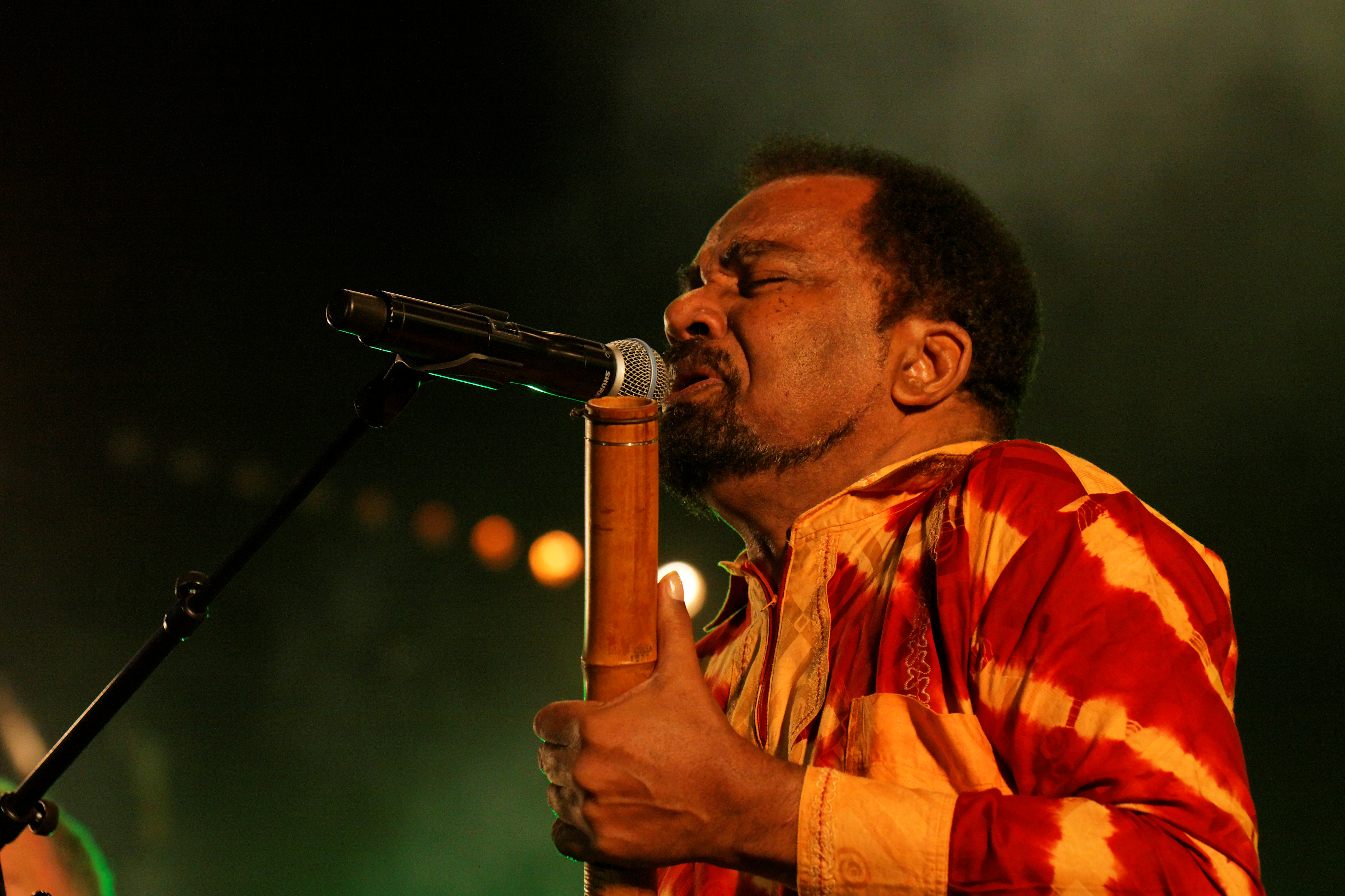 Bonga, invité par Bernard Lavilliers, est en concert sur la scène Landaoudec lors du festival du bout du Monde à Crozon dans le Finistère (France).